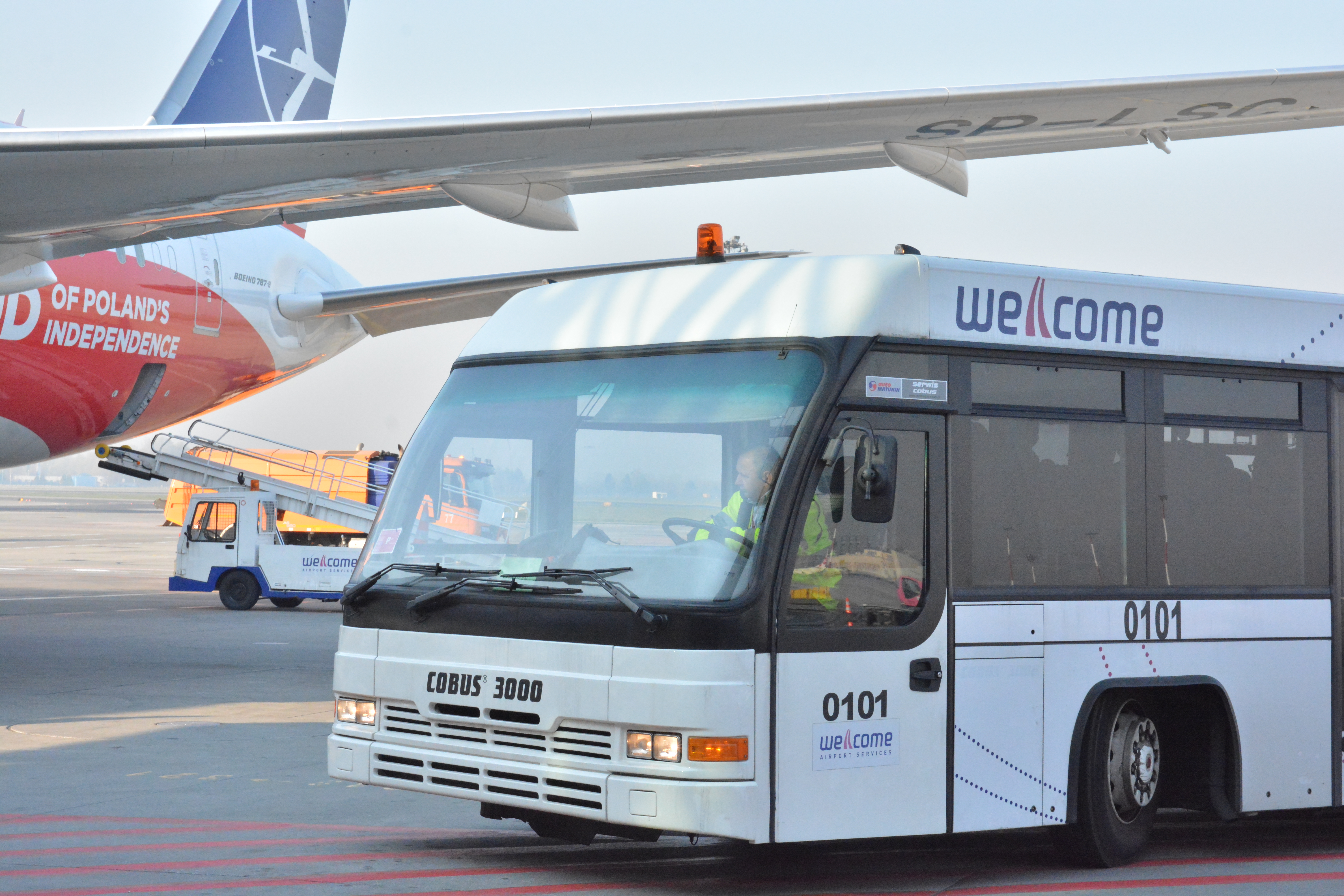 Autobus WELCOME Airport Services na Warsaw Chopin Airport 2019